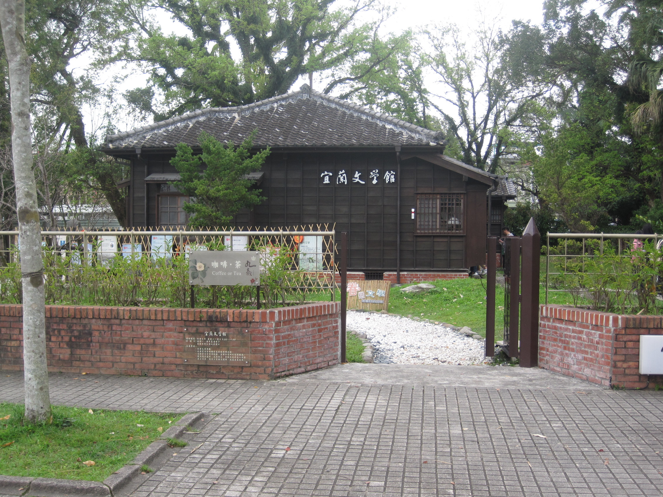 宜蘭文學館，原是舊農校校長宿舍